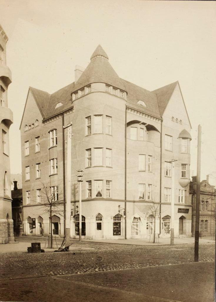 Valokuvassa on Birger Federleyn suunnittelema jugendtyylinen Blomin talo, joka sijaitsi Tampereella Hämeenkadun ja Kuninkaankadun kulmassa. Talo rakennettiin 1907 ja purettiin 1955. Sen paikalle nousi myöhemmin Stockmannin tavaratalo.